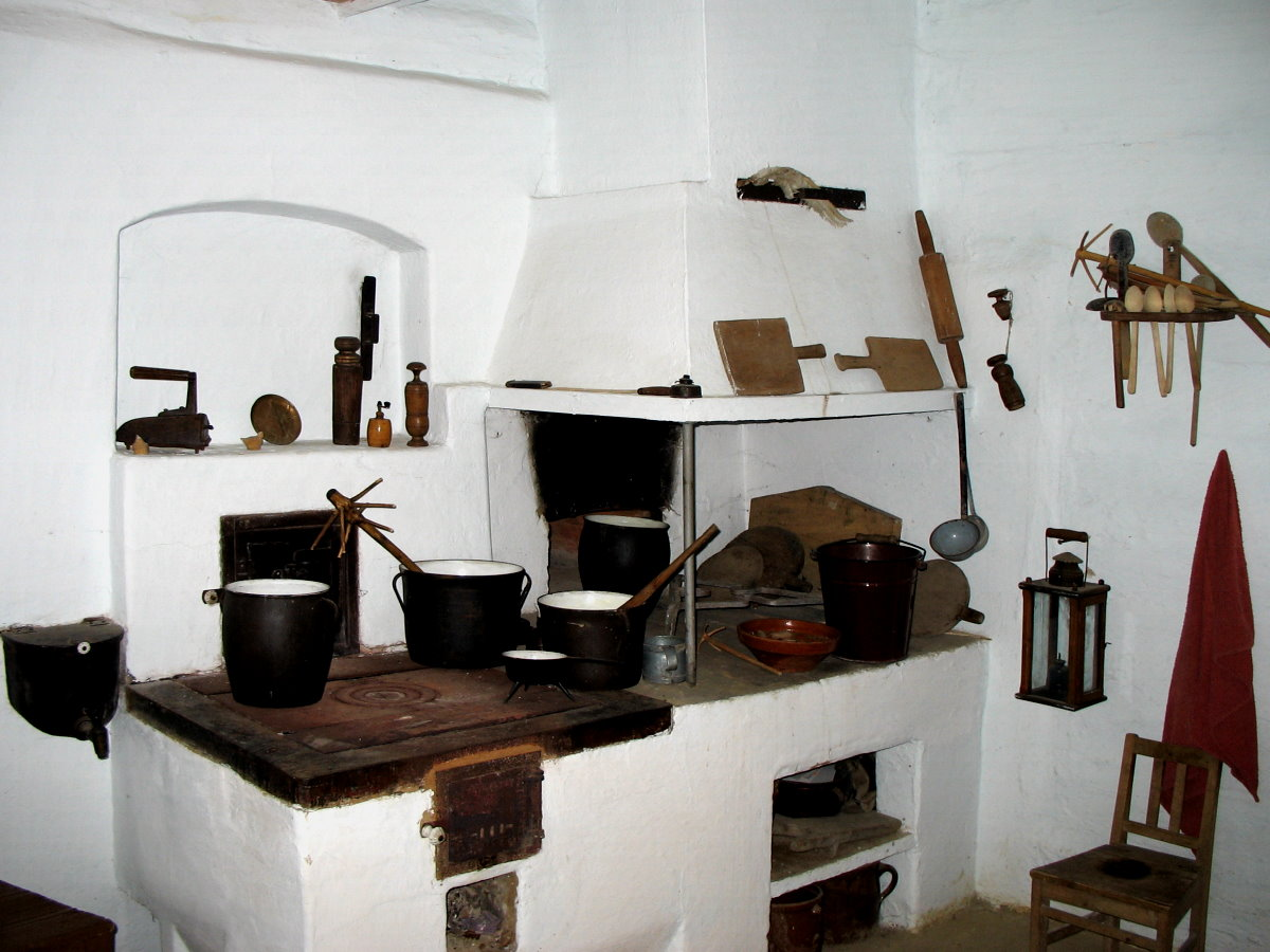 Muzeum Wsi Markowa (Polska) - piec w kuchni chaty